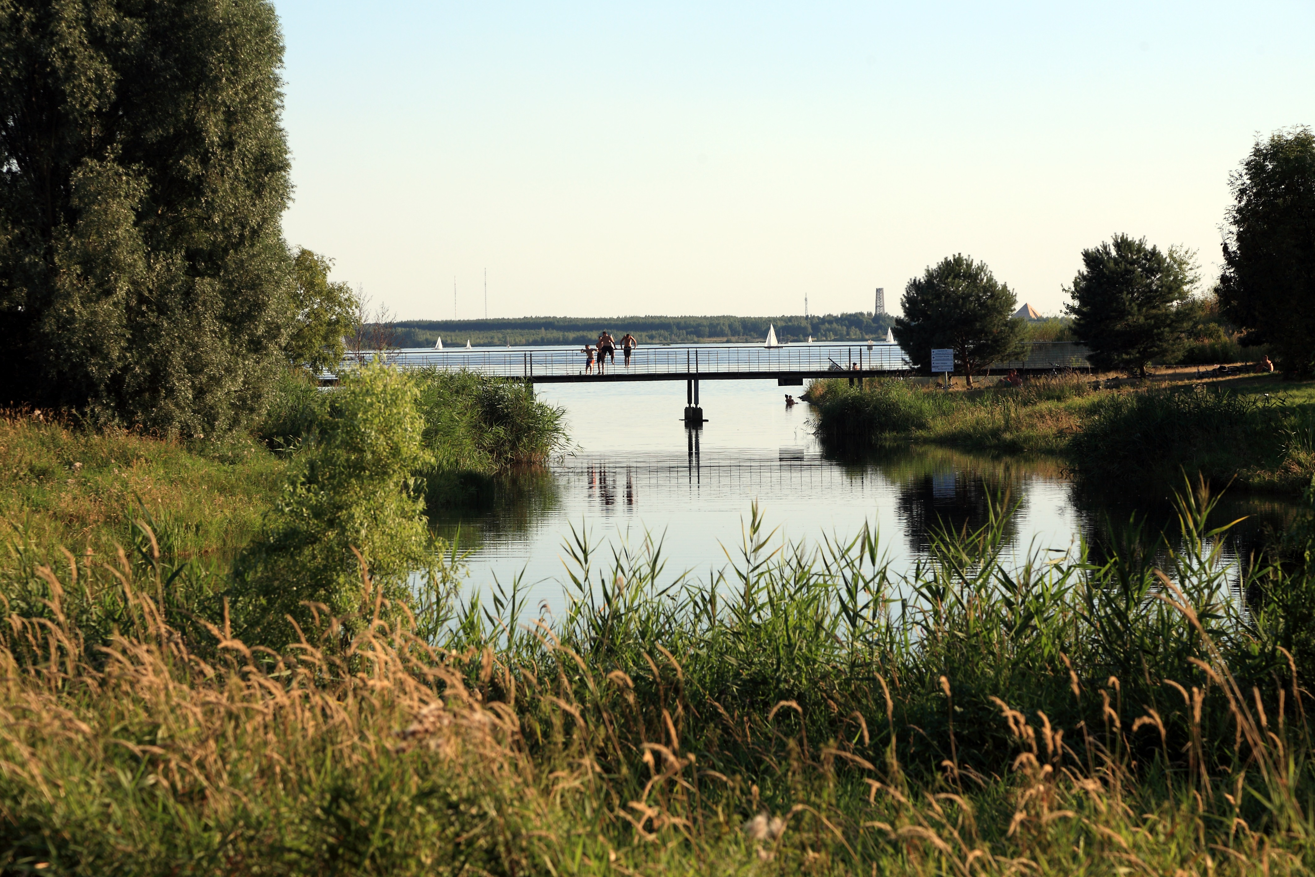 Verbindungskanal Waldsee Lauer–Cospudener See Richtung Cospudener See, auf der linken Seite liegt die Schleuse Cospuden.